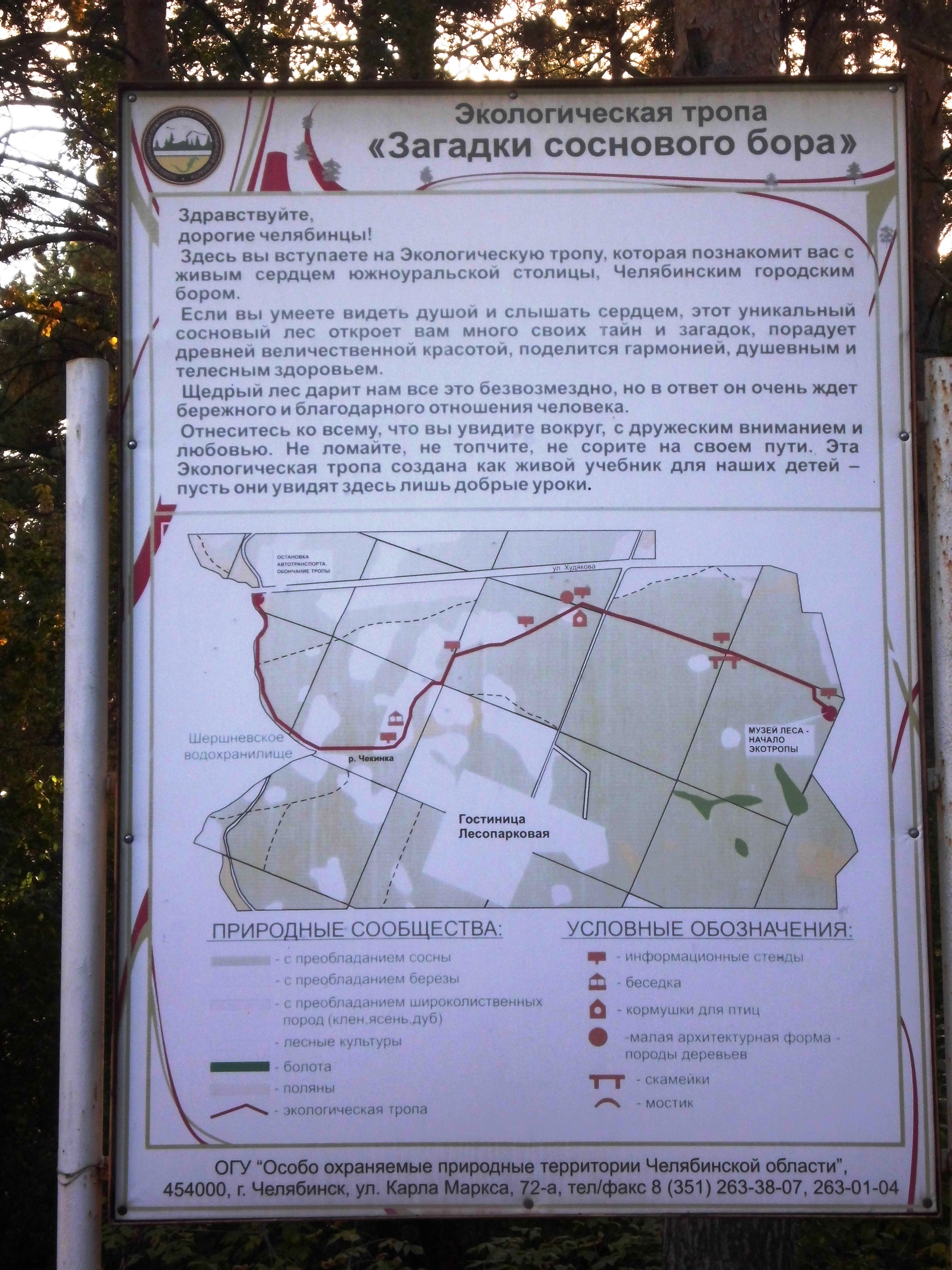 Челябинский городской бор, таблички у пожарного въезда в конце улицы Варненской (у областной больницы). Город Челябинск.